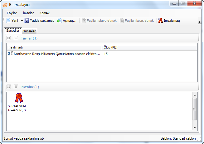 E-ımzalayıcı proqramı